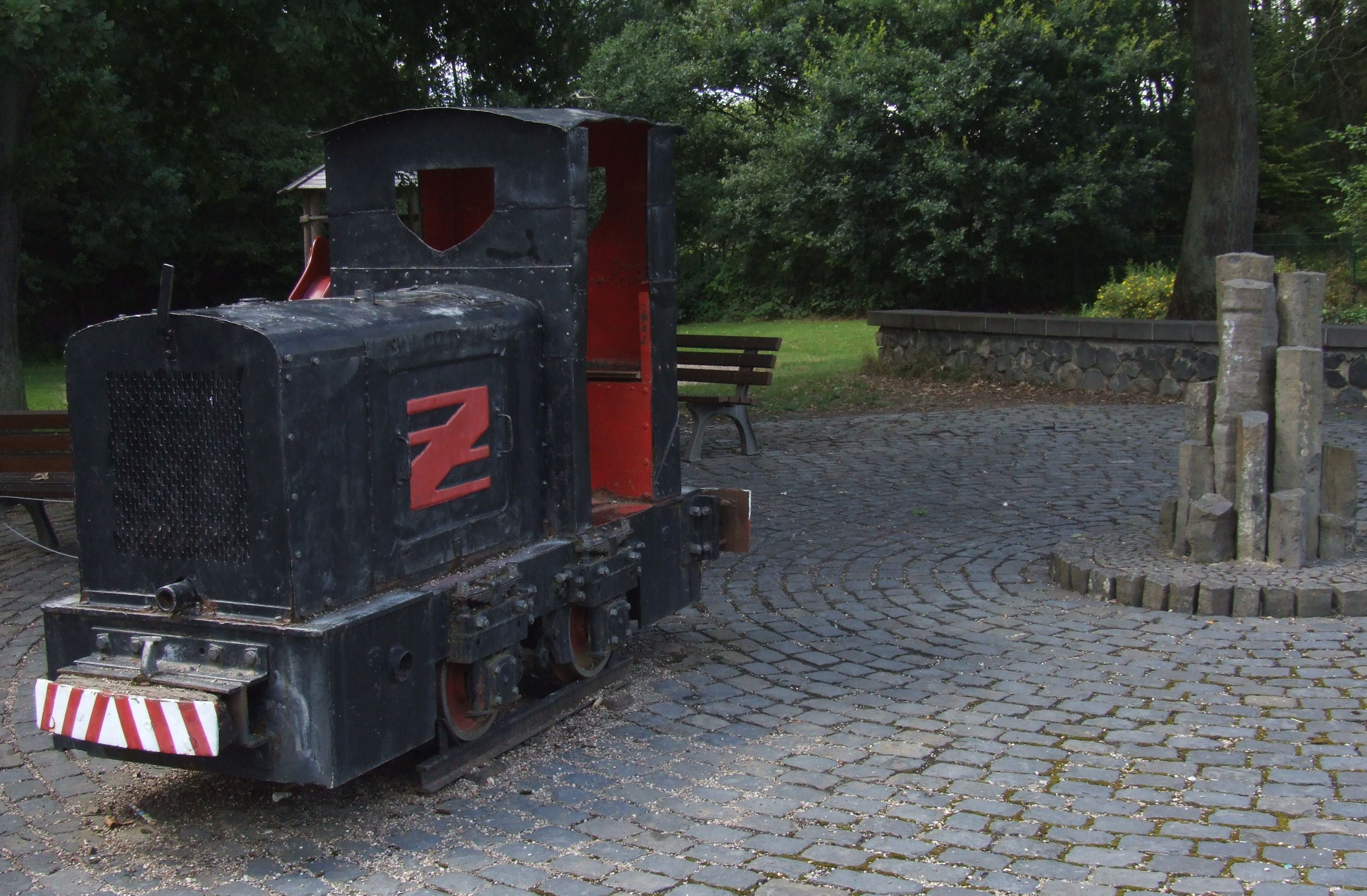 600 mm-Schmalspurdiesellok EL 110 (Fabrikationsnummer 9649) der Arnold Jung Lokomotivfabrik (ursprünglich mit Jung-Motor vom Typ SE-110 (Einzylinder-Zweitakt-Dieselmotor mit 11 PS Fabrikationsnummer 5995) in Vettelschoß vor dem ehemaligen Betriebsleiter-Gebäude – dem heutigen Vereinshaus, seit Frühjahr 1975 als Spielgerät vor dem Kindergarten aufgestellt.